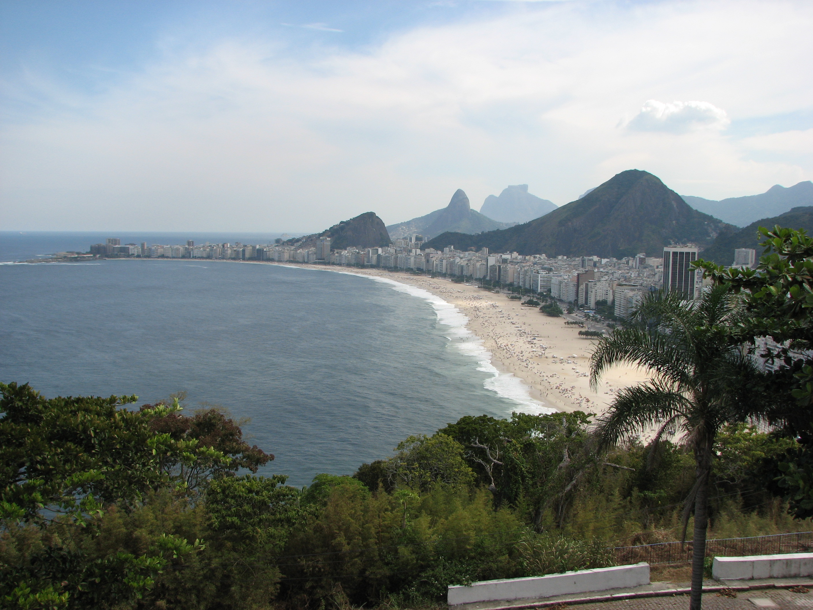 Fotografia da Praia de Copacabana, no Rio de Janeiro, Brasil Fotografada por mim, em 08 de abril de 2007